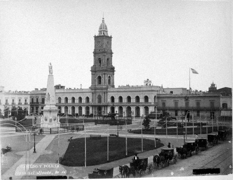 El Cabildo de la Ciudad de Buenos Aires y la Policía.